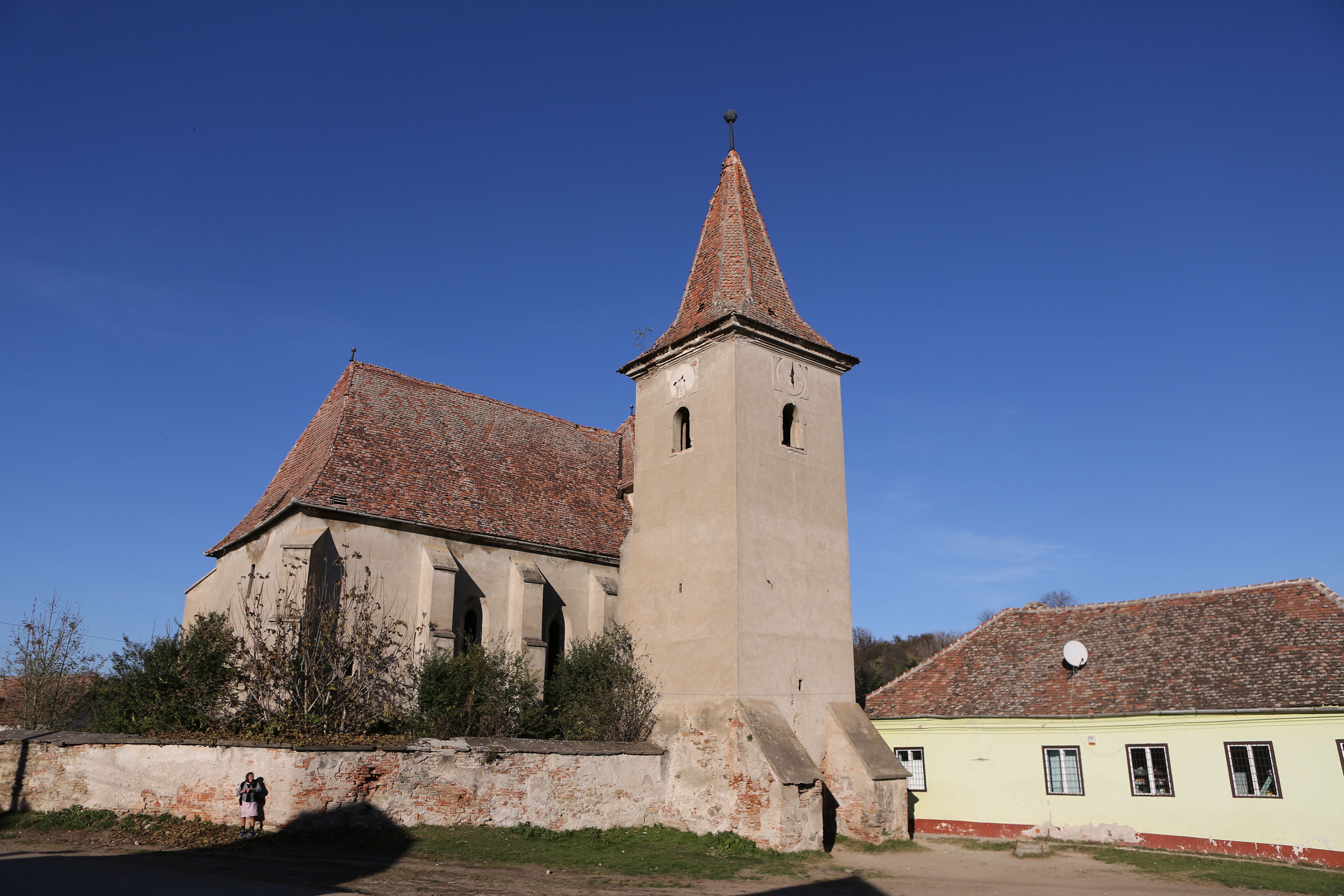 Biserica evanghelică fortificată 01